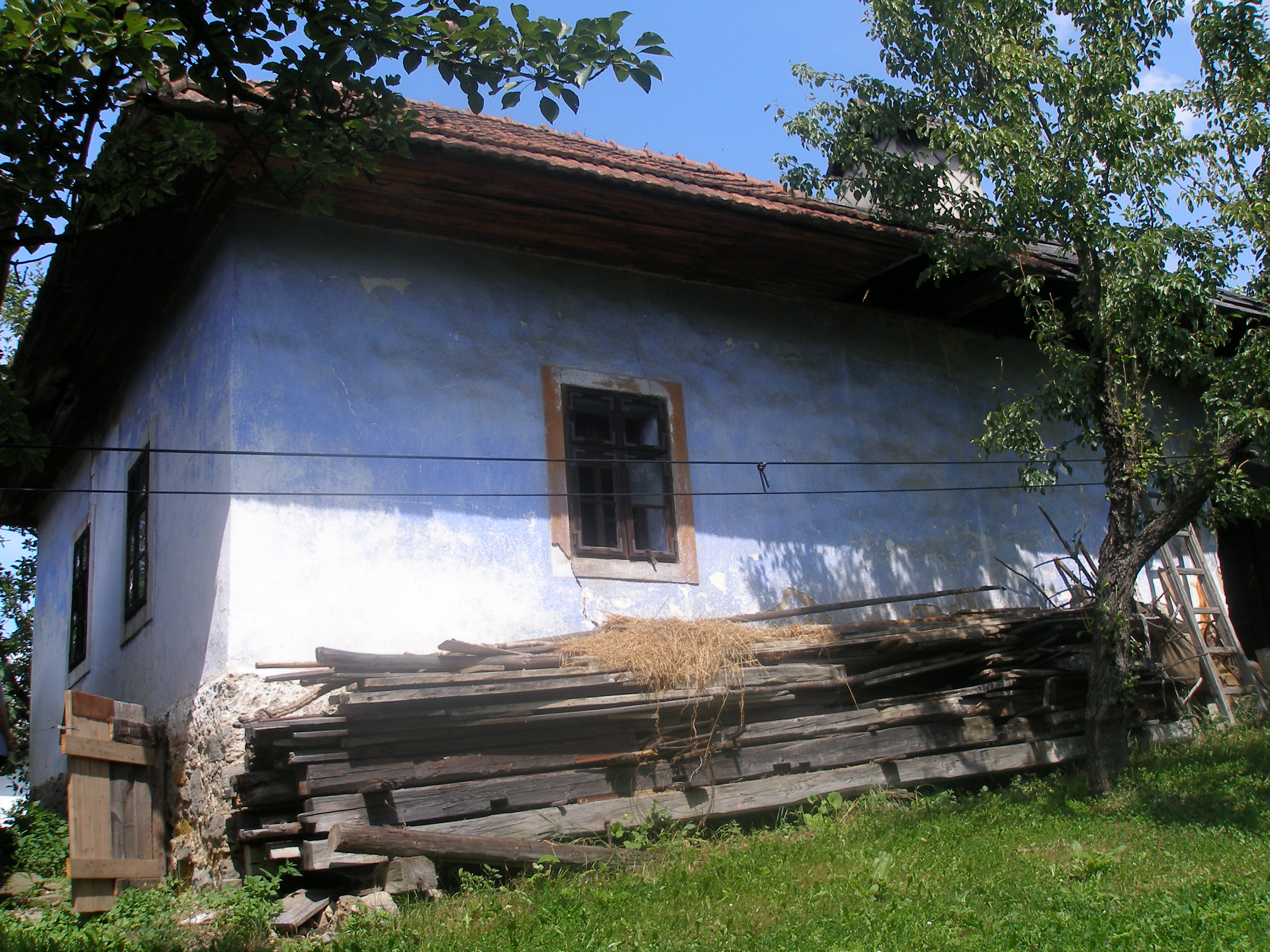 Starý gazdovský dom asi z roku 1860. Obec Sedlice región Šariš.